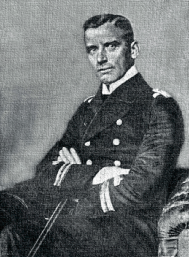 Hellmuth von Mücke 1917